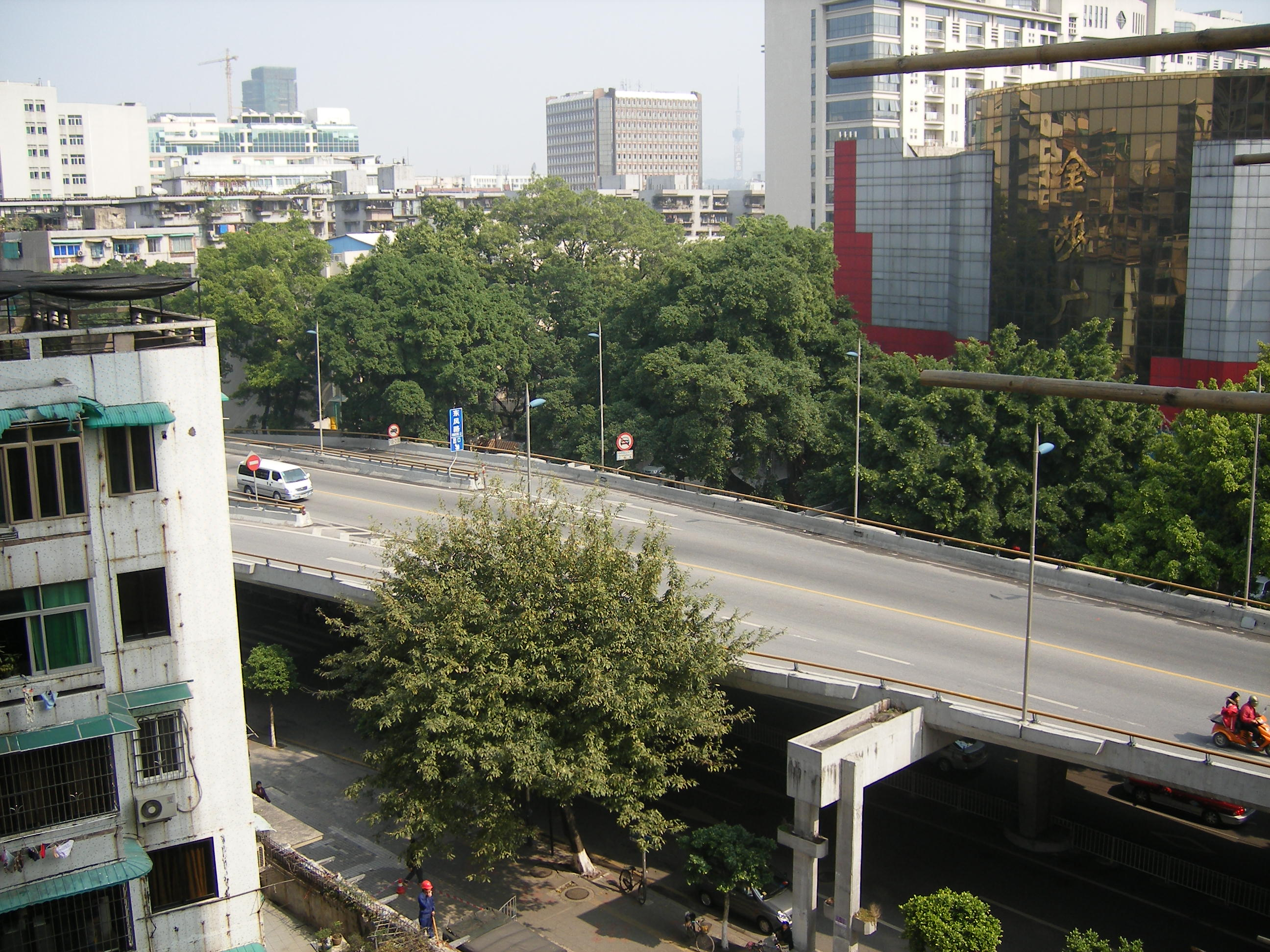 广州市人民路高架路。